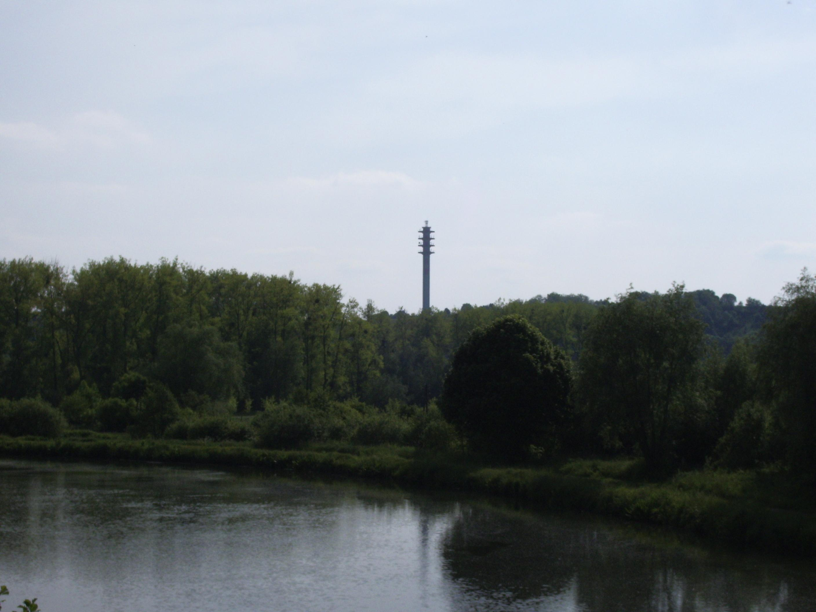 Au premier plan la Somme, au second la tour Hertzienne du mont Caubert photo prise depuis Abbeville